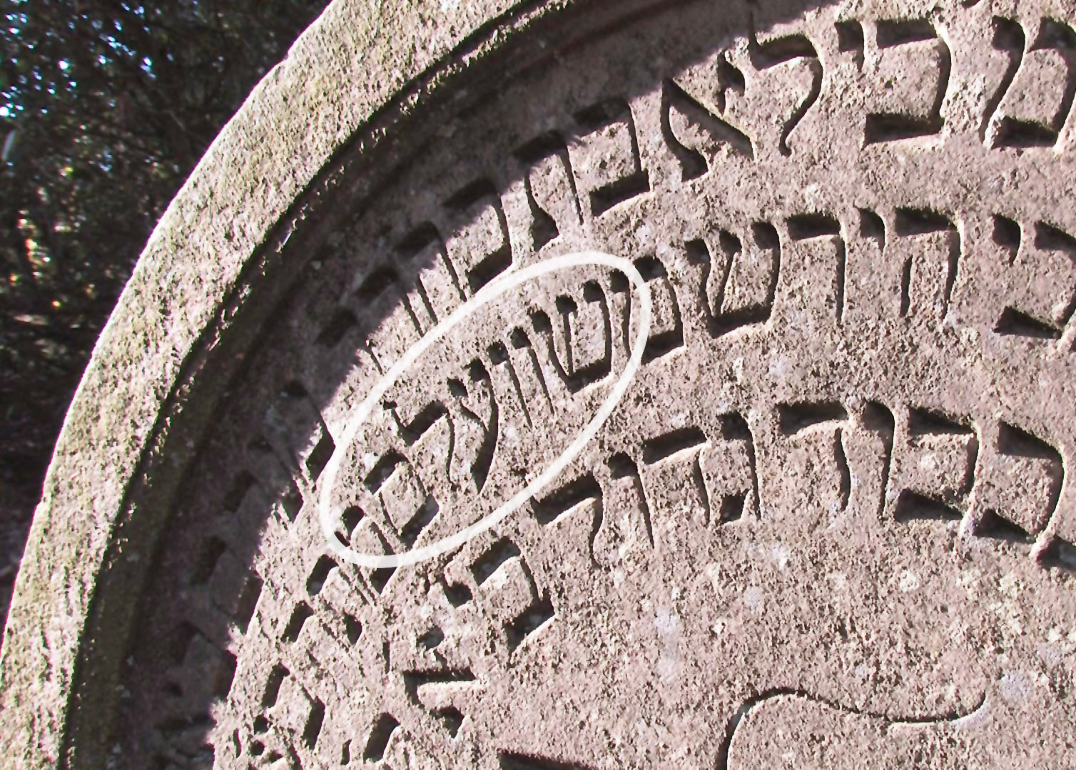 Jüdischer Friedhof Schwelm, Grabstein Bejle Joseph (1843), Detail der Inschrift (mit Markierung): „Schwelm“ in Hebräisch